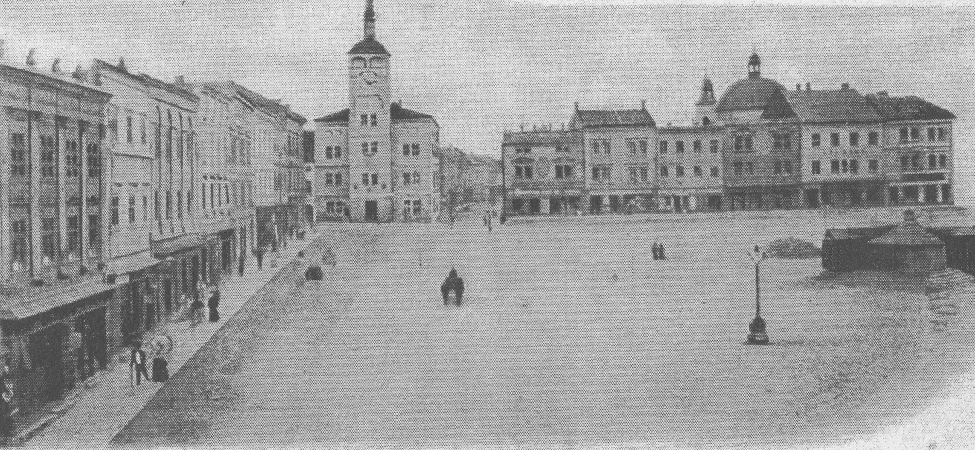 Kašna na Velkém náměstí, Velké náměstí, Kroměříž. Dobová fotografie náměstí s kašnou opatřenou bedněním proti zamrznutí.